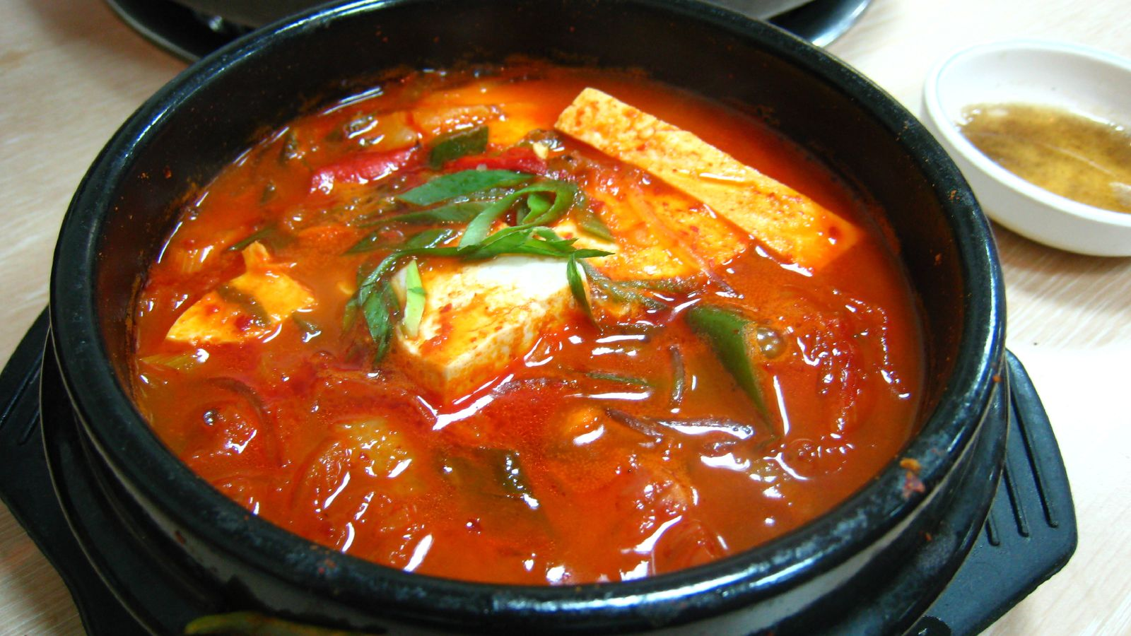 Kimchi jjigae (kimchi stew) in Korean cuisine